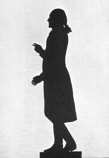 Karl Ludwig von Knebel. Die für das letzte Viertel des 18.Jahrhunderts charakteristische Form des Porträts ist die des Schattenrisses, die in den achtziger Jahren ihre Blüte erreichte. Der Hauptsilhoutteur des Weimarer Kreises war wohl Starke, dem auch die Reihe der hier wiedergegebenen ganzfigurigen Schnitte zuverdanken ist. Die Persönlichkeiten sind schon früher genannt. Sämtliche Schattenrisse waren 1932 im Besitz der Sammlung Kippenberg, mit Ausnahme der Frau von Stein und Knebel, die 1932 im Besitz des Goethe-Nationalmuseums in Weimar waren.